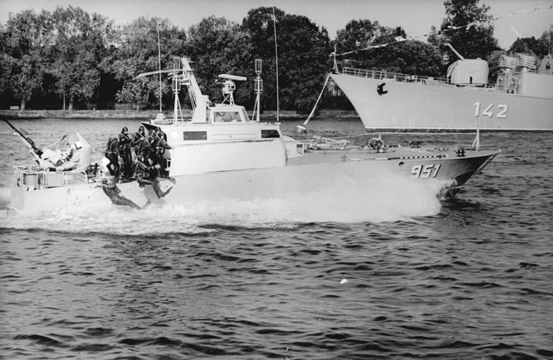 Rostock, Flottenparade, Schnellboote ADN-ZB Sindermann 4.10.79 Rostock: Flottenparade der Volksmarine Kampfschwimmer der Volksmarine tauchen von Schnellbooten in die aufgewühlte Warnow. Sperrfrist 7.10.79 14.00 Uhr [Rostock.- Kampfschwimmer des Kampfschwimmerkommando 18 (KSK-18) beim Sprung von Kleinem Torpedoschnellboot Projekt 131 Typ Libelle der Volksmarine (Kennung "951")]